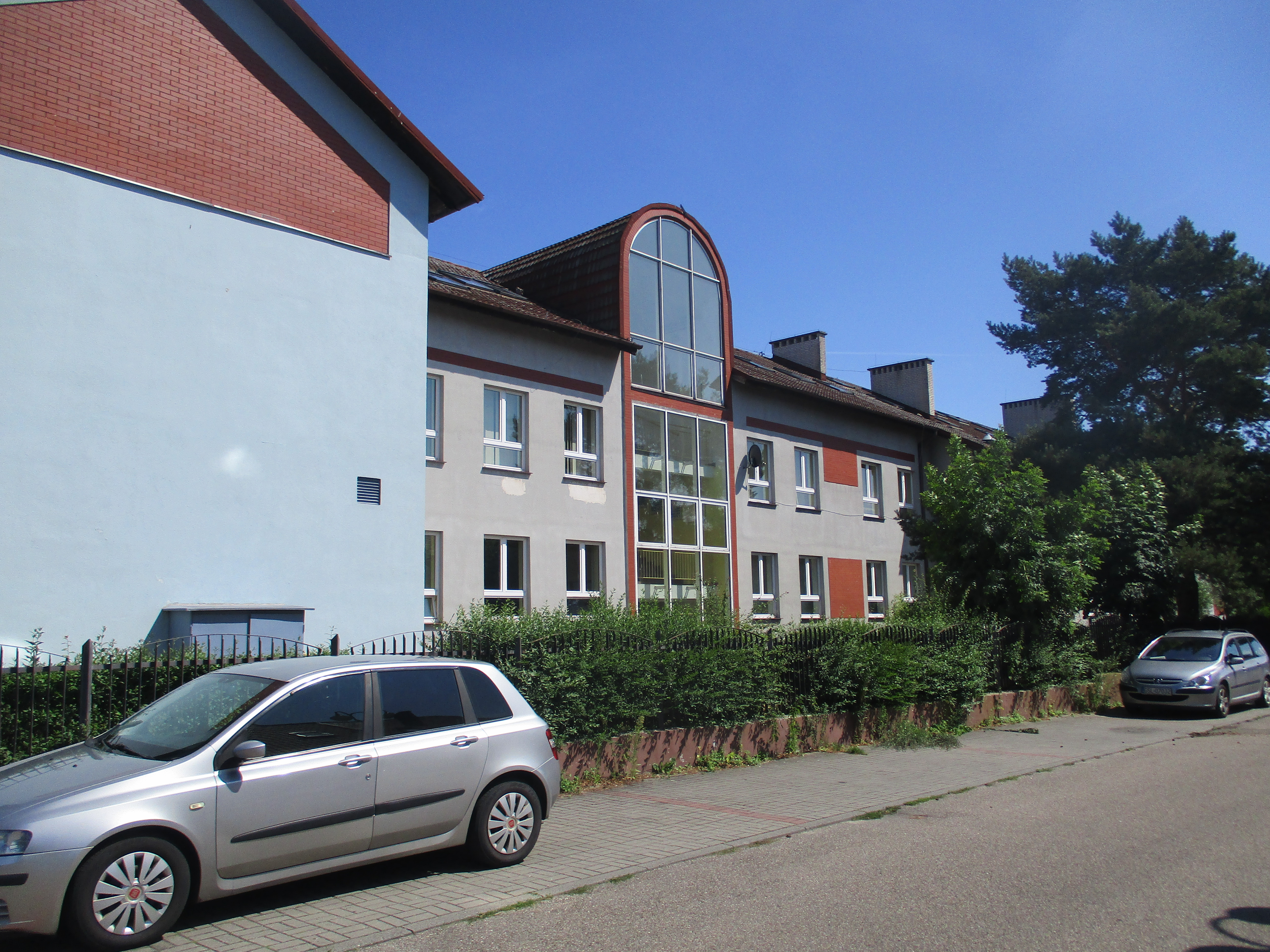 Ustka, ul. Bursztynowa- szkoły